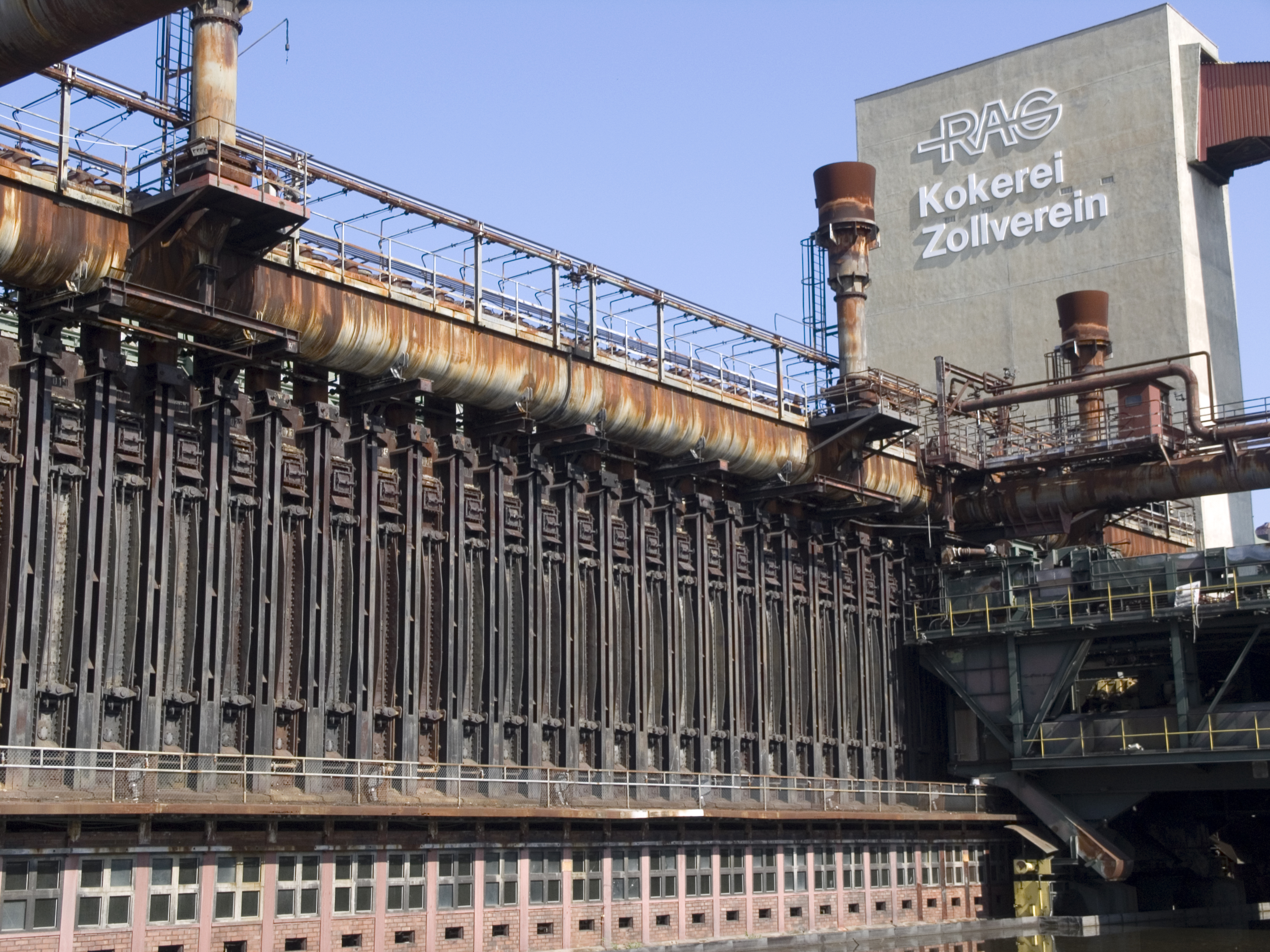 Северный Рейн - Вестфалия, Эссен. Шахта Цольферайн, коксовый завод